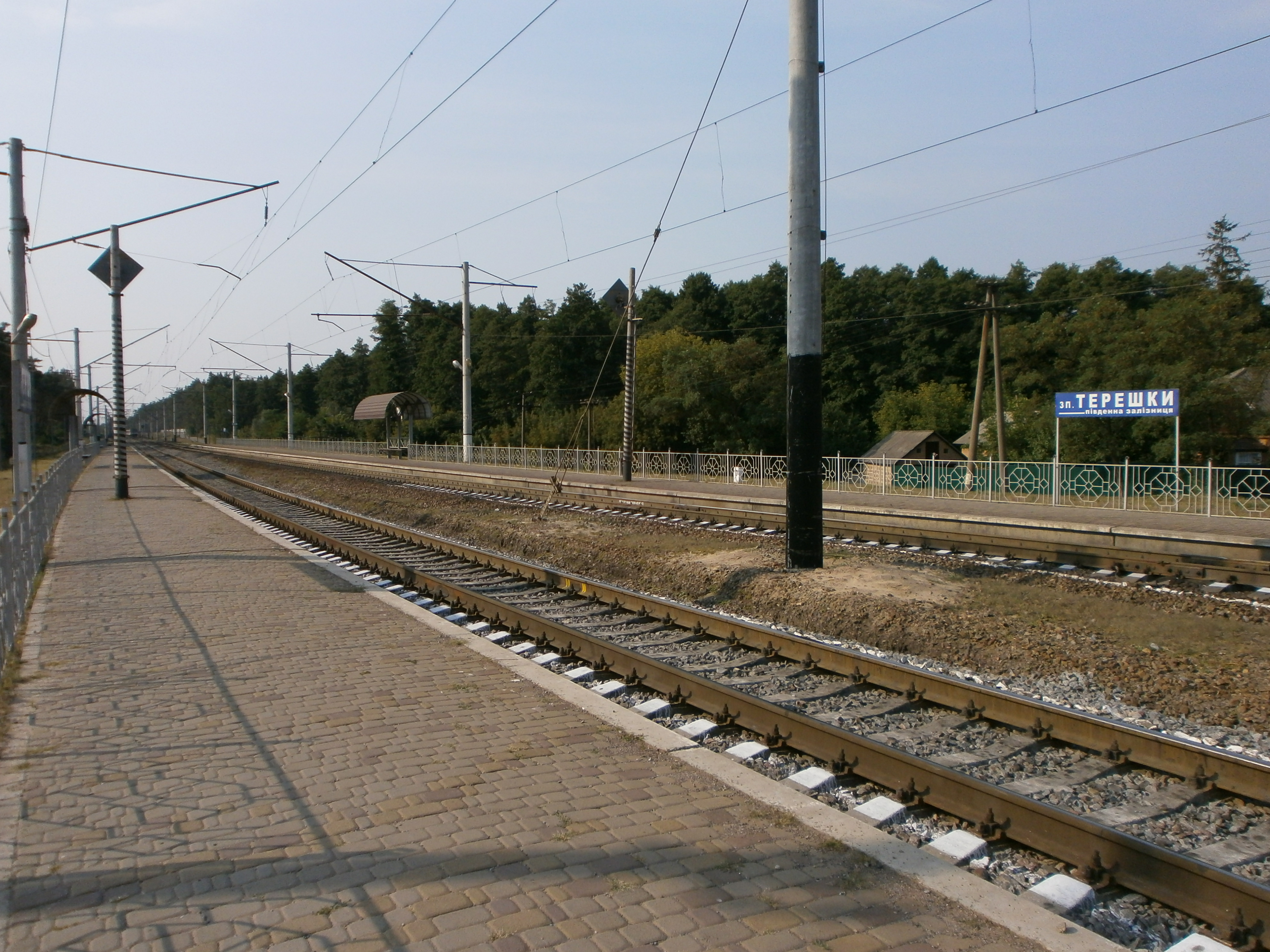 Загальний вигляд залізничної зупинки у селі Терешки Полтавського району, 2015 р.